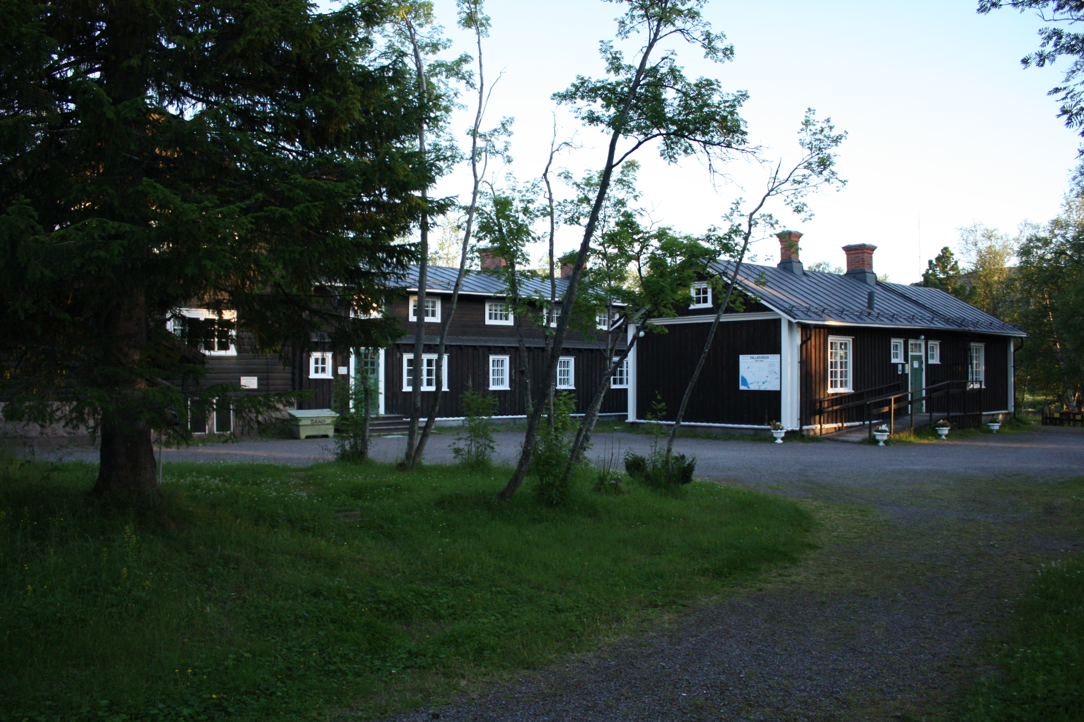 Hjalmar Lundbohmsgården som den såg ut 2008.